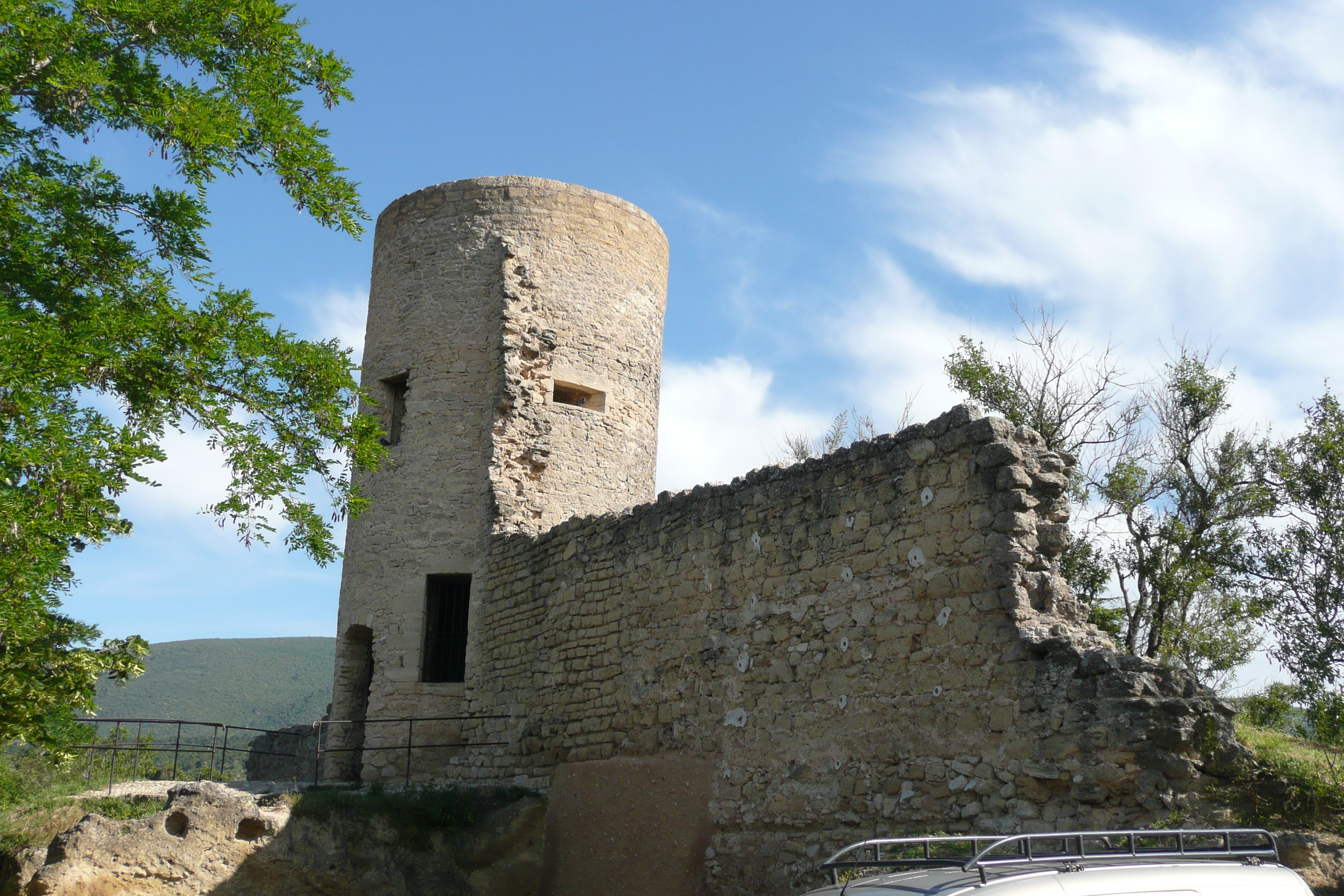 Tour Sus-Pous de Cucuron (Vaucluse, France).